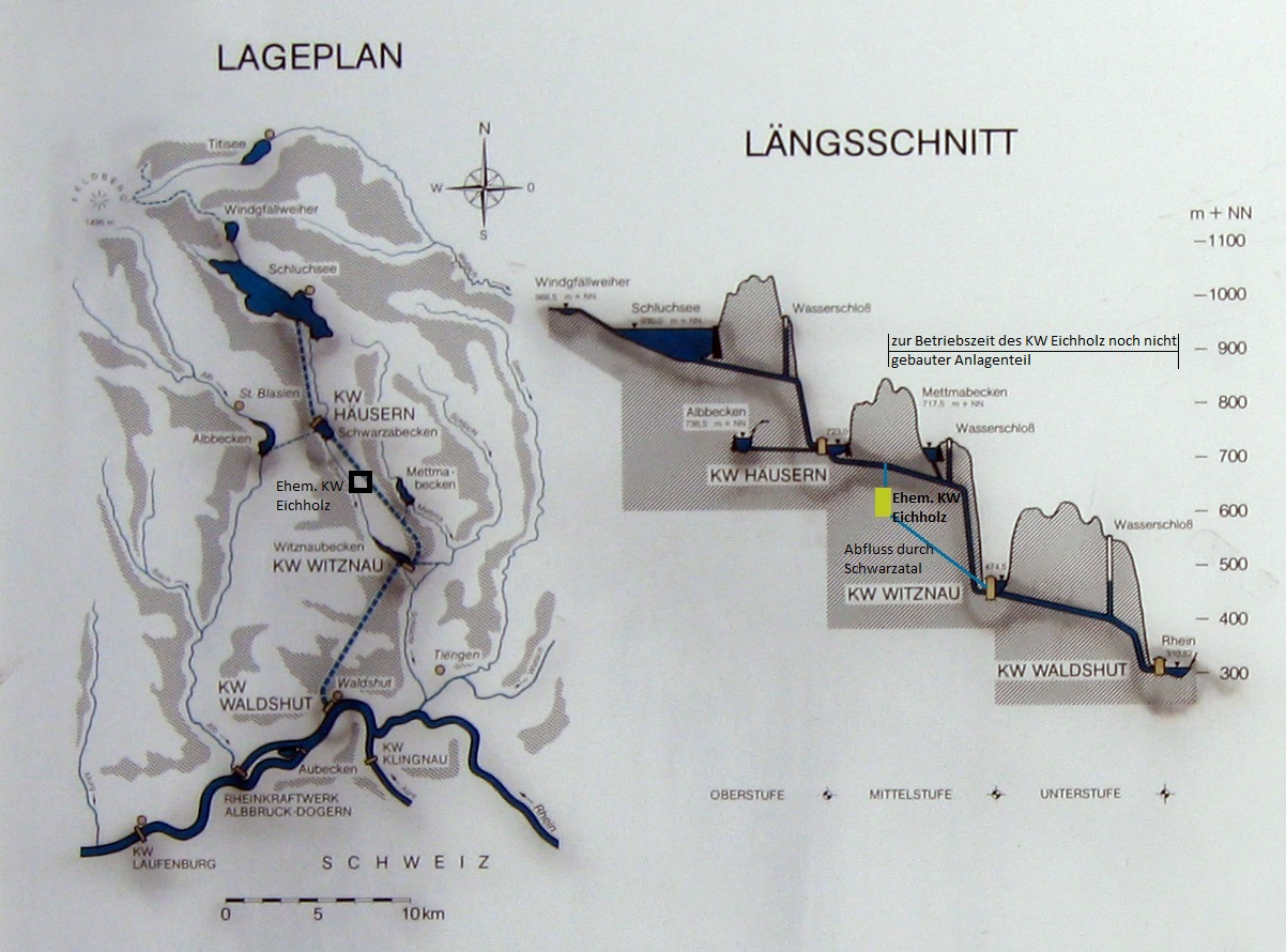 Kraftwerk Eichholz innerhalb der Werksgruppe Schluchsee eingezeichnet auf ein Foto der Infotafel an der Staumauer in Seebrugg